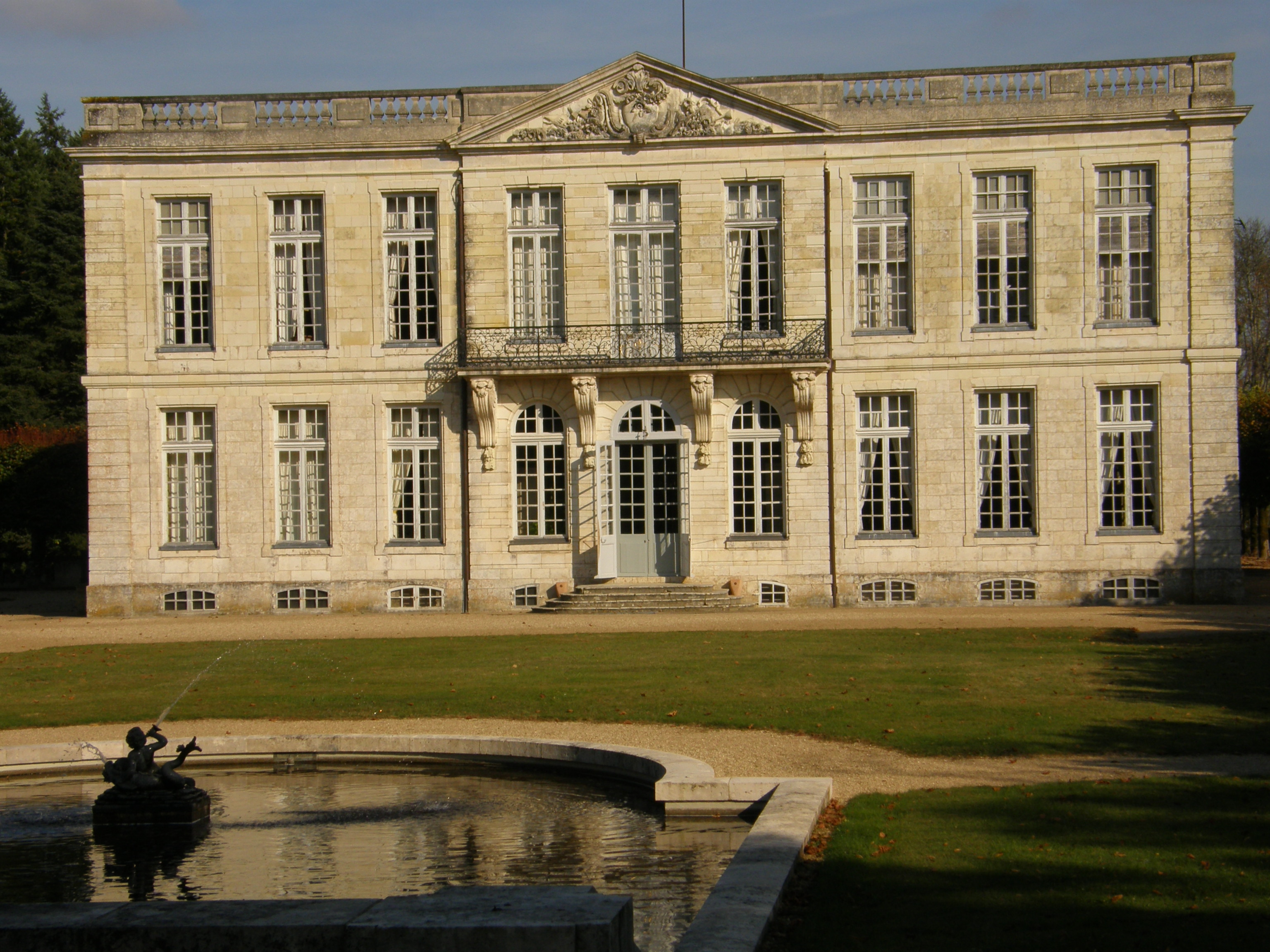 Bouges-le-Château, Indre, France